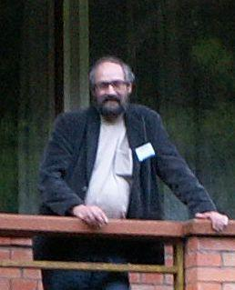 Sergei Anatolyevich Starostin (Сергей Старостин, Звенигород), June 2nd 2005